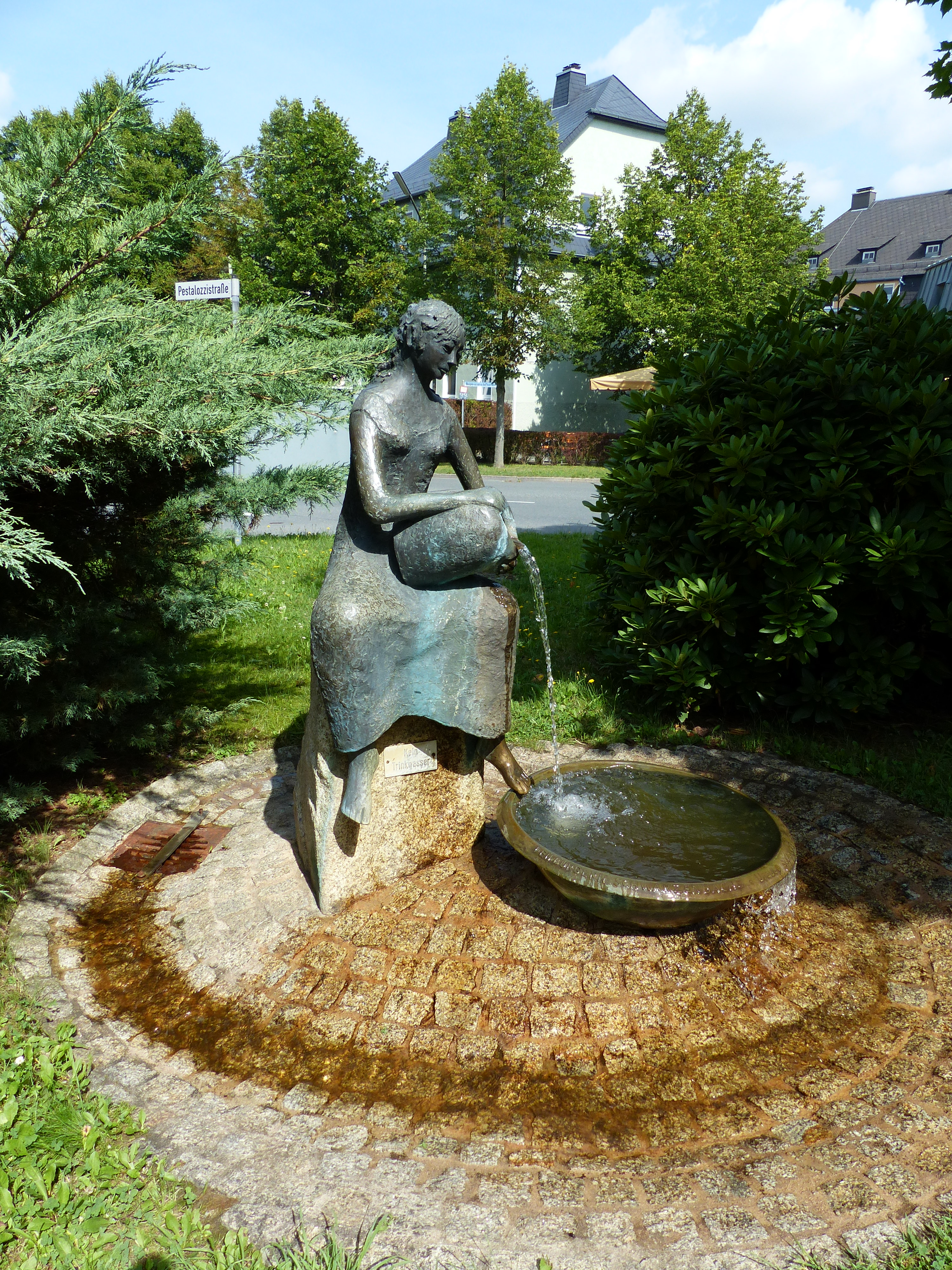 Brunnen von Margarete Wiggen in Schwarzenbach an der Saale